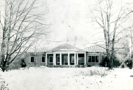 Дом Баратынских в усадьбе Мара